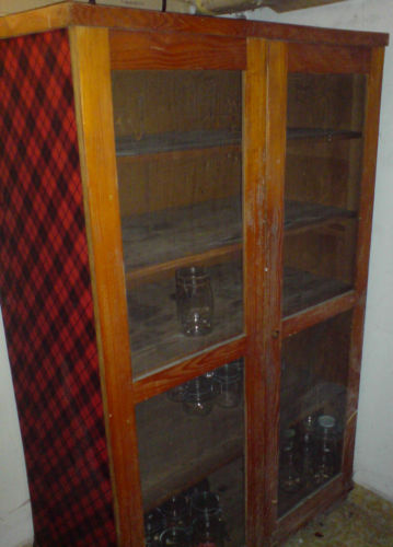 Ein alter Fliegenschrank wie er früher als es noch keine Kühlschränke gab zur Vorratshaltung in fast jedem Haushalt vorhanden war.